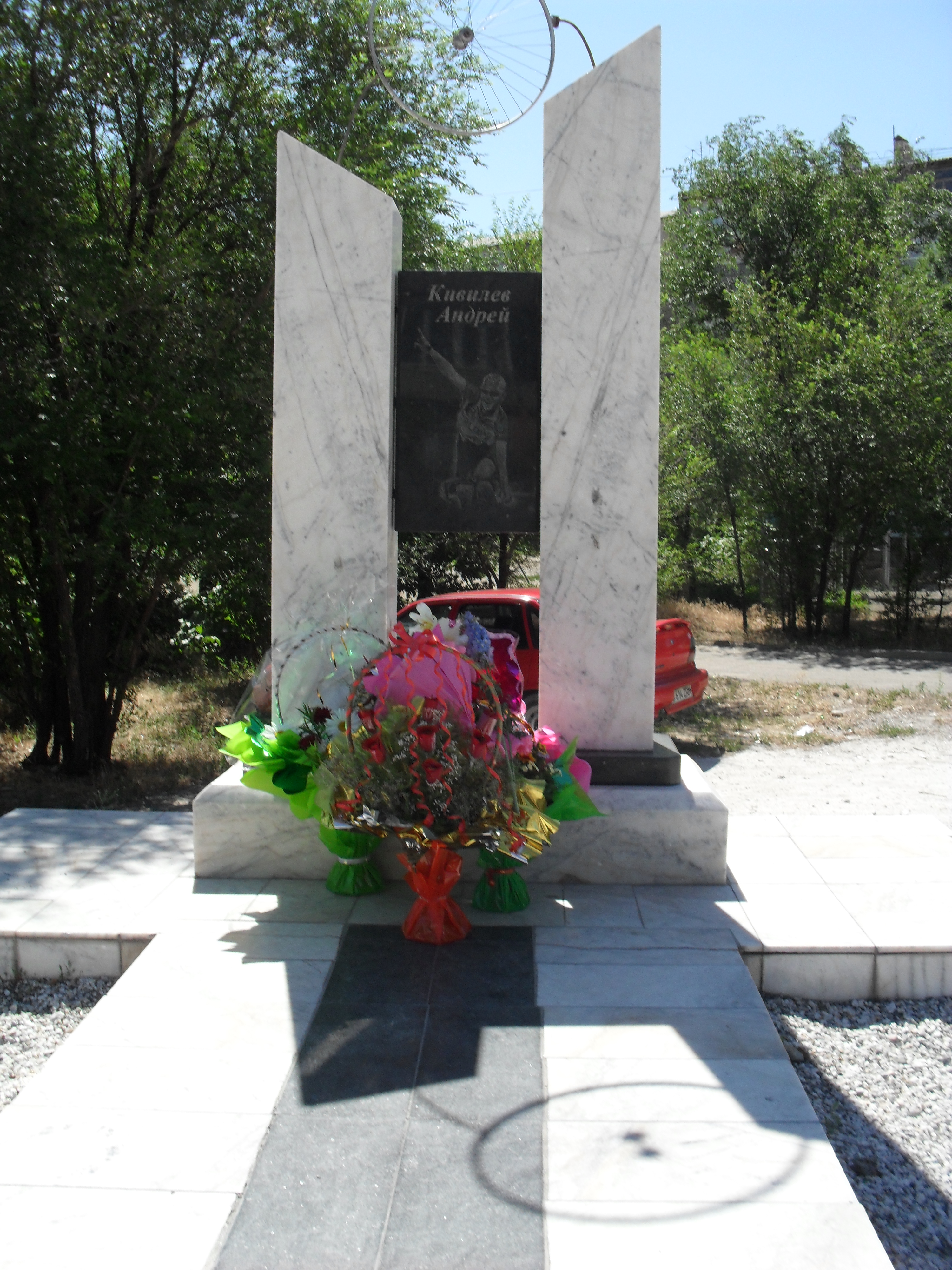 памятник Андрея Кивилева